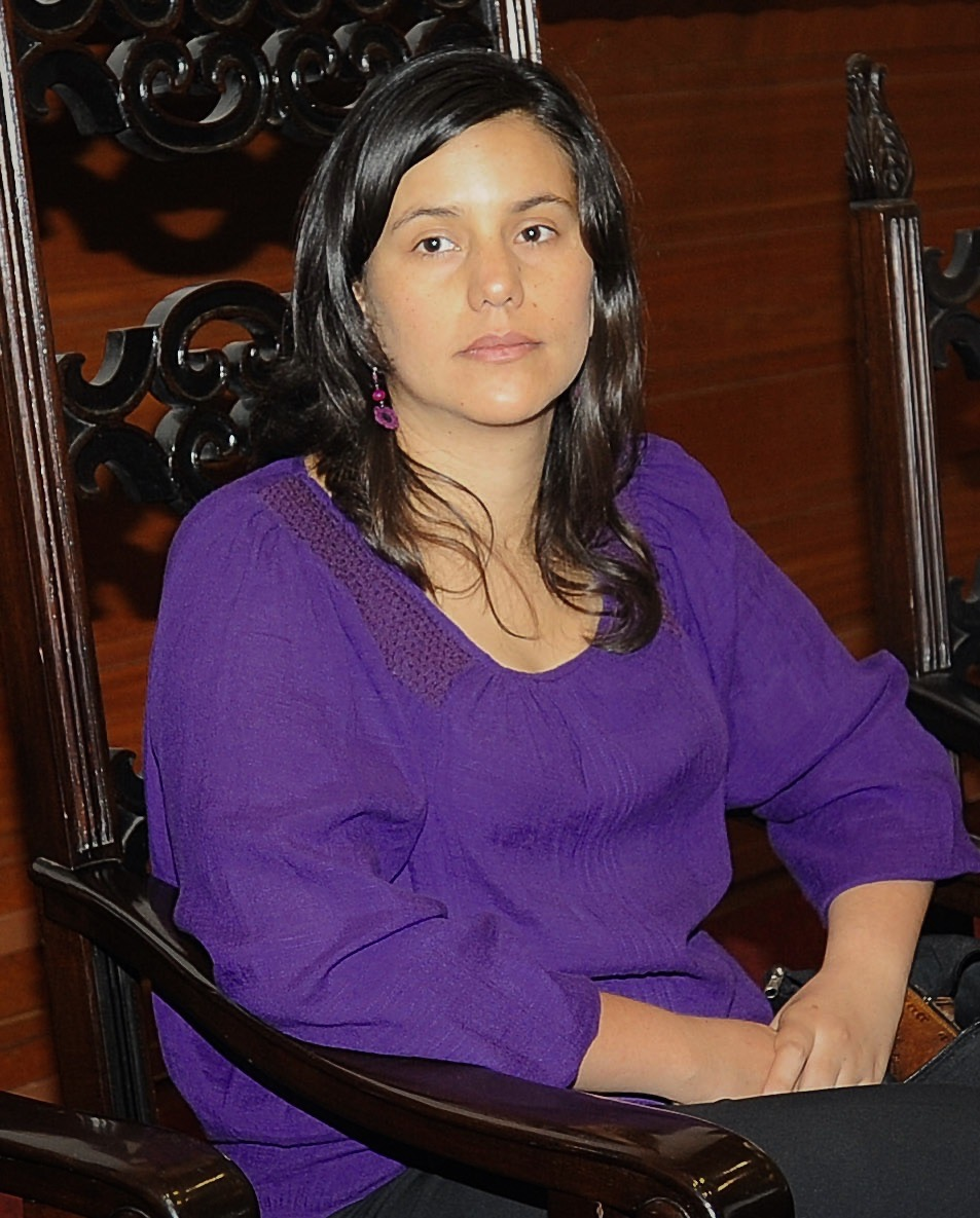 Verónica Mendoza, congresista (2011-2016) y candidata a la presidencia del Perú en 2016.